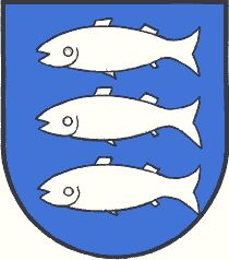 Wappen der ehemaligen Gemeinde Oberaich, Steiermark